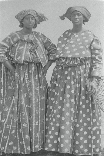 Deze foto's zijn afkomstig van de website Ze zijn gemaakt rond 1905. We kunnen er dus vanuit gaan dat de rechten verlopen zijn.